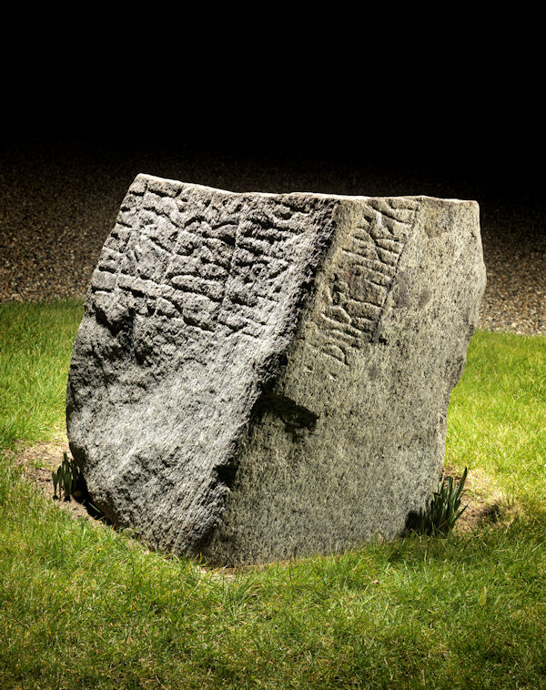 Foto af Roberto Fortuna